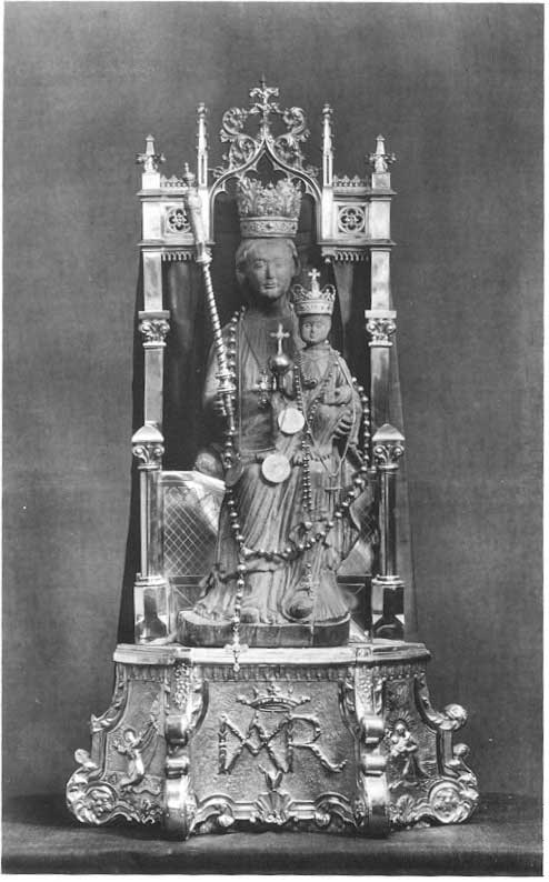 Boalsert, Us Leaffrou fan Sânwâlden